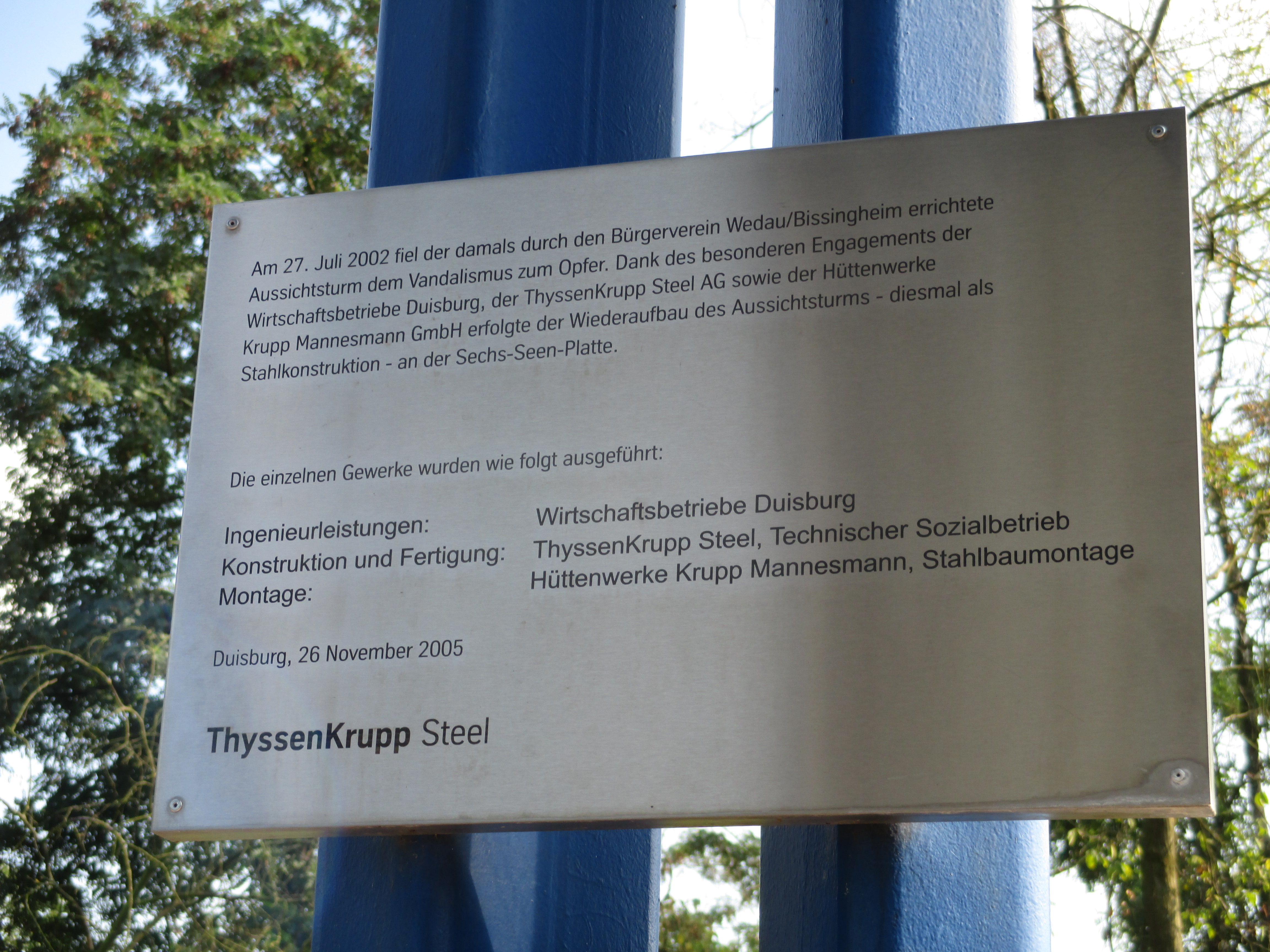 Stiftungstafel am Aussichtsturm auf der Wolfsberghalde in Duisburg.